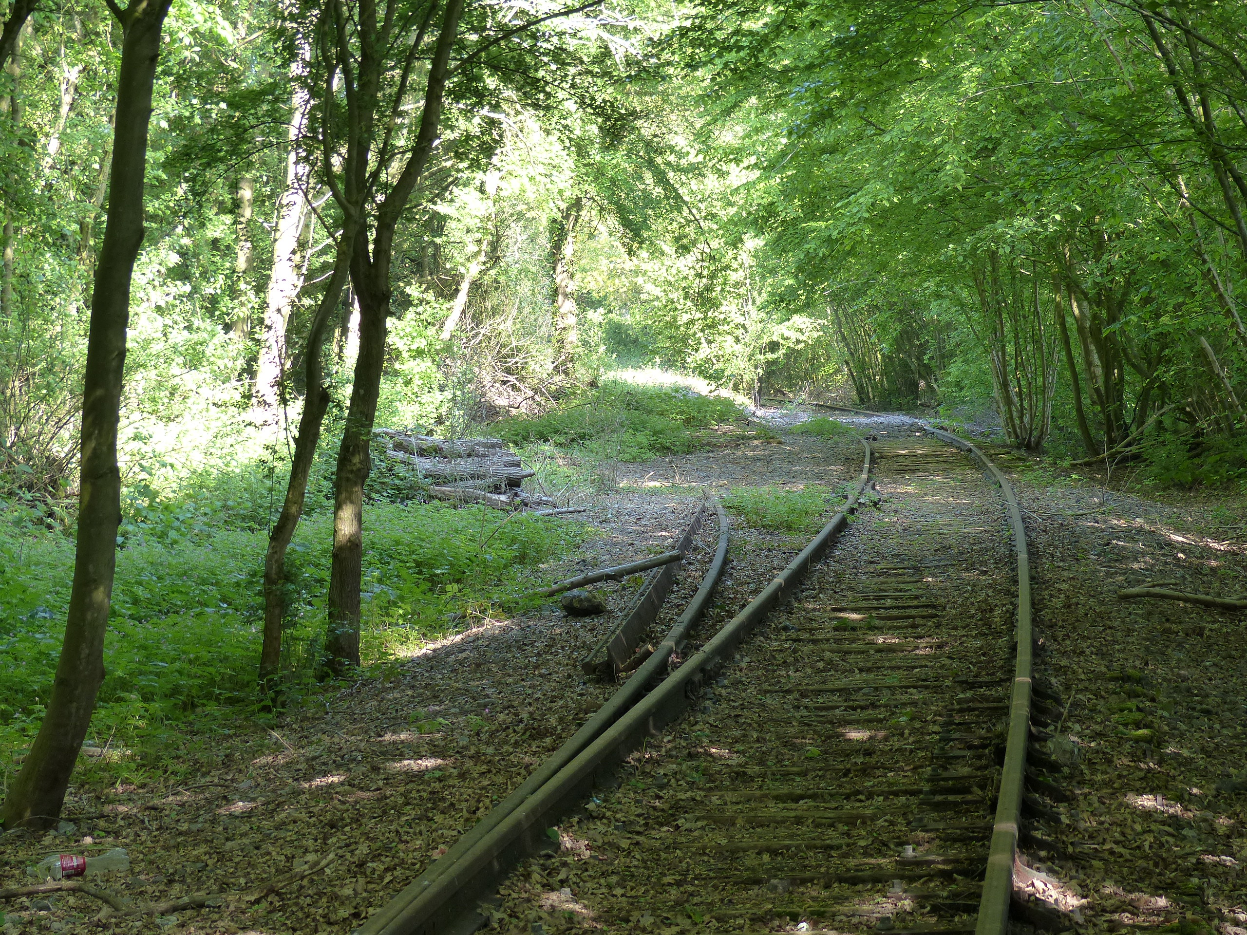 Vestiges de l'embranchement de l'usine à chaux de Crèvecoeur